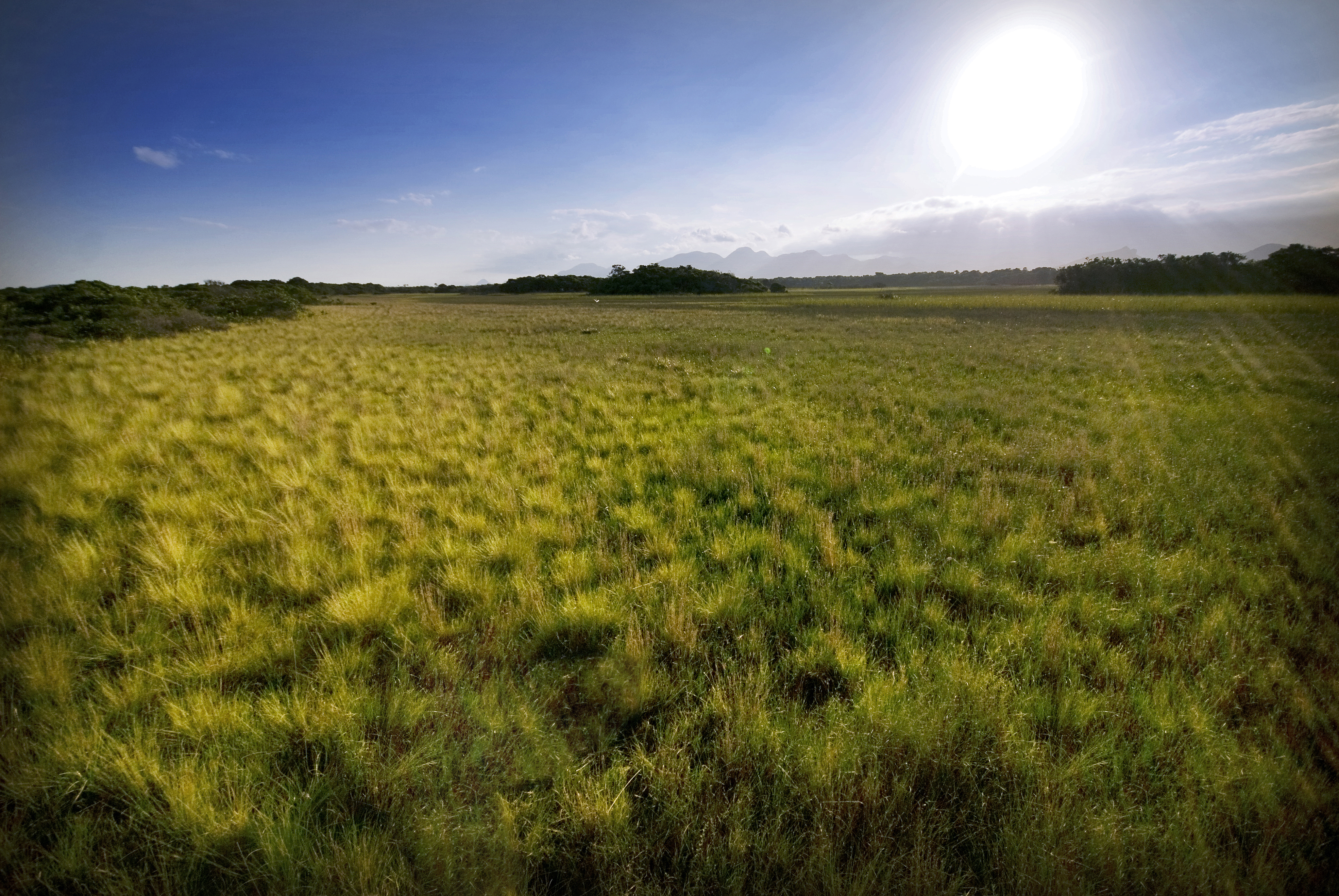 Brejo no Parque Estadual Paulo César Vinha, um local apaixonante pela sua beleza. A grama de aspecto dourado parece ter sido tirado de um filme, remete muito as imagens das Savanas africanas.